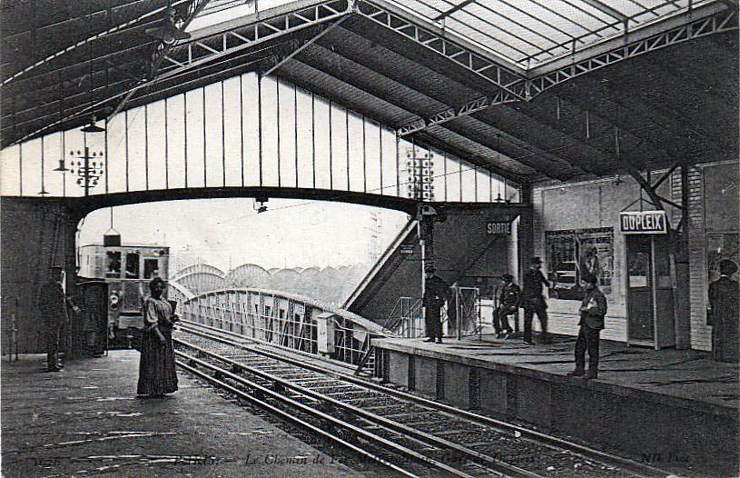 Paris - Le Métropolitain station Dupleix